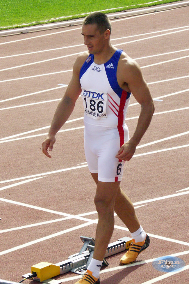 Roman Šebrle world championships 2005 Helsinki. Mise en ligne le 25 juillet 2007